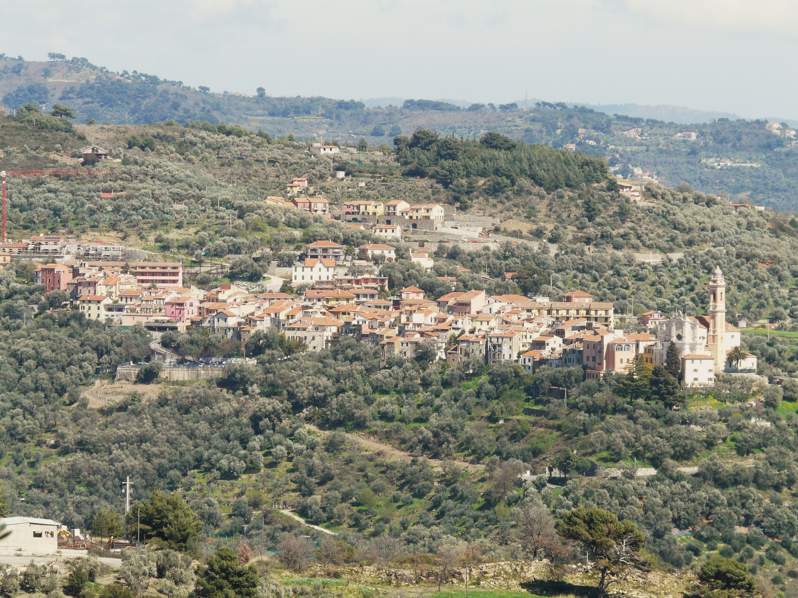 Civezza, Liguria, Italia